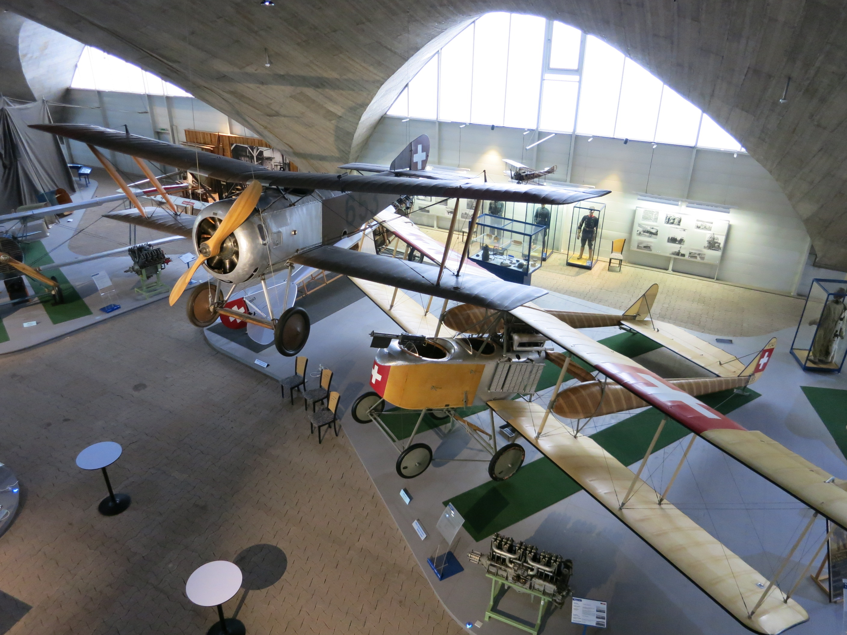 Flieger-Flab-Museum, Dübendorf ZH, Schweiz